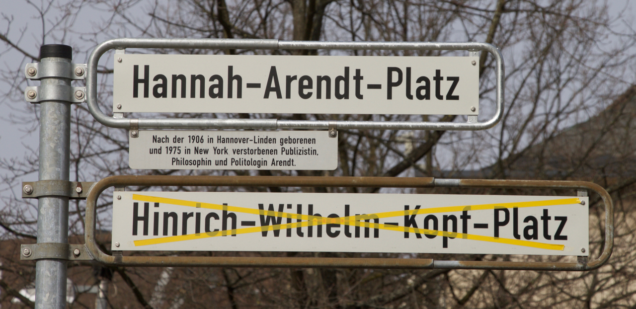 Aufnahme im Frühling 2016. Neuer und alter Namen des Hannah-Arendt-Platz (ehemals Hinrich-Wilhelm-Kopf-Platz) werden gezeigt.